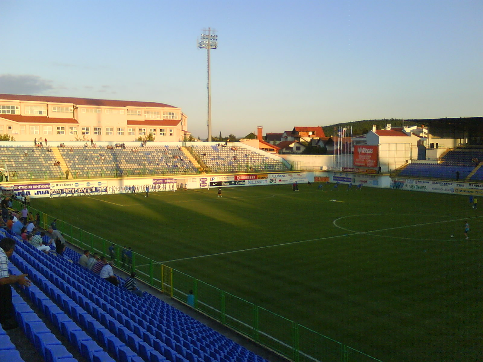 Pecara-utakmica Široki Brijeg-Banants